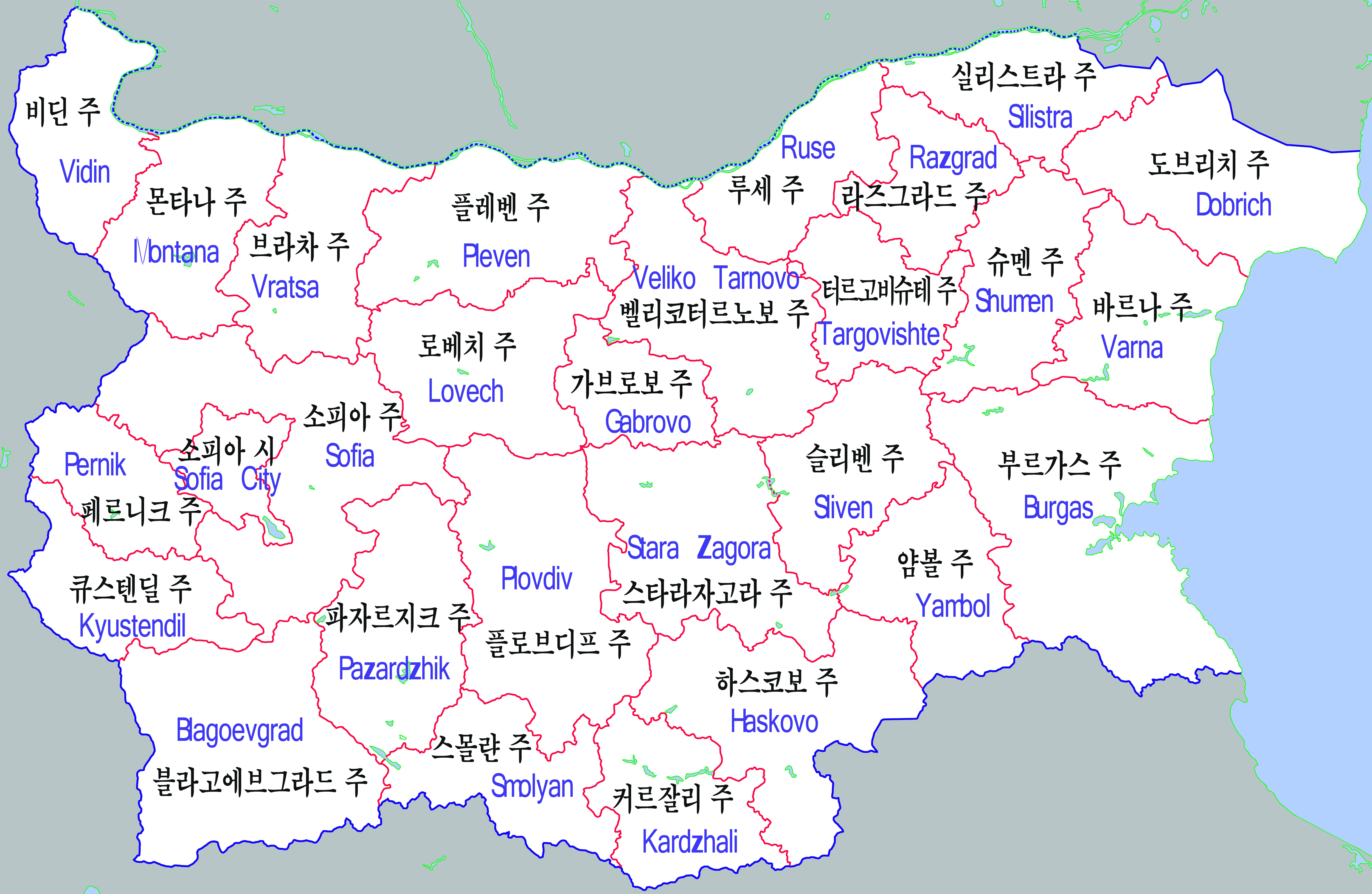 불가리아 행정구역